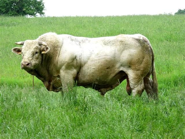 Taureau charolais au pré.